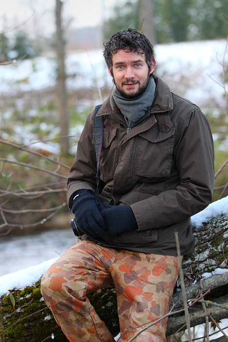 Remo Savisaar